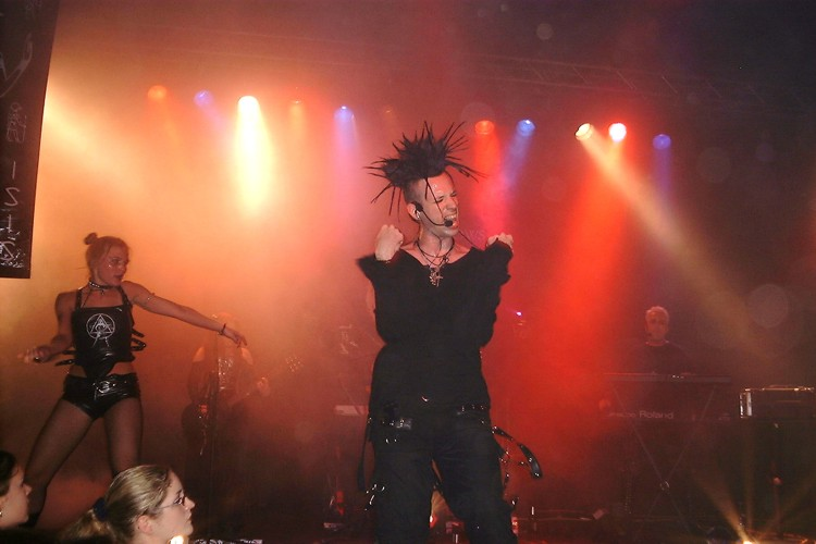 selbst fotografiert